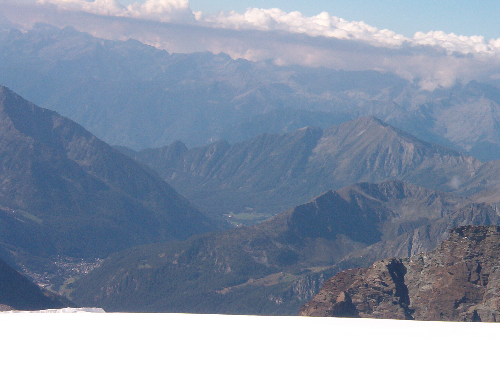 Val d'Ayas dal Grande Ghiacciaio di Verr - Valle d'Aosta - Italia